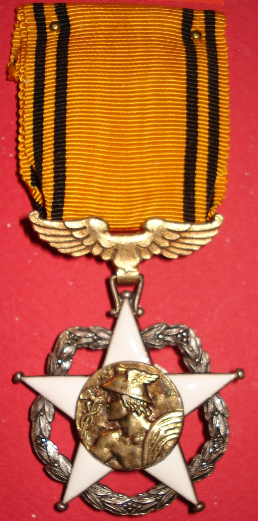 Etoile à 5 branches aux pointes ^pommelées, émaillées de blanc. Une couronne de laurier réunit les branches. Le médaillon central représente une effigie du Dieu Mercure et au revers une trompe, une enveloppe et les foudres électriques et les mots REPUBLIUQUE FRANCAISE - MERITE POSTAL. Ruban jaune d'or avec deux raies noires de chaque côté.